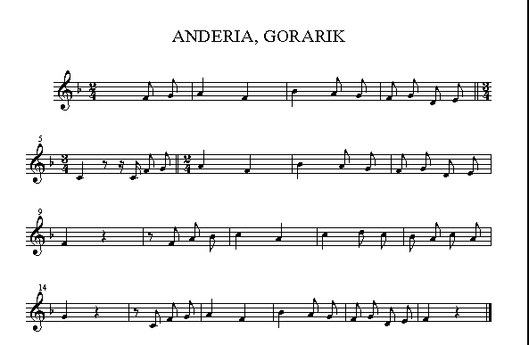 Anderea gorarik abestiaren partitura